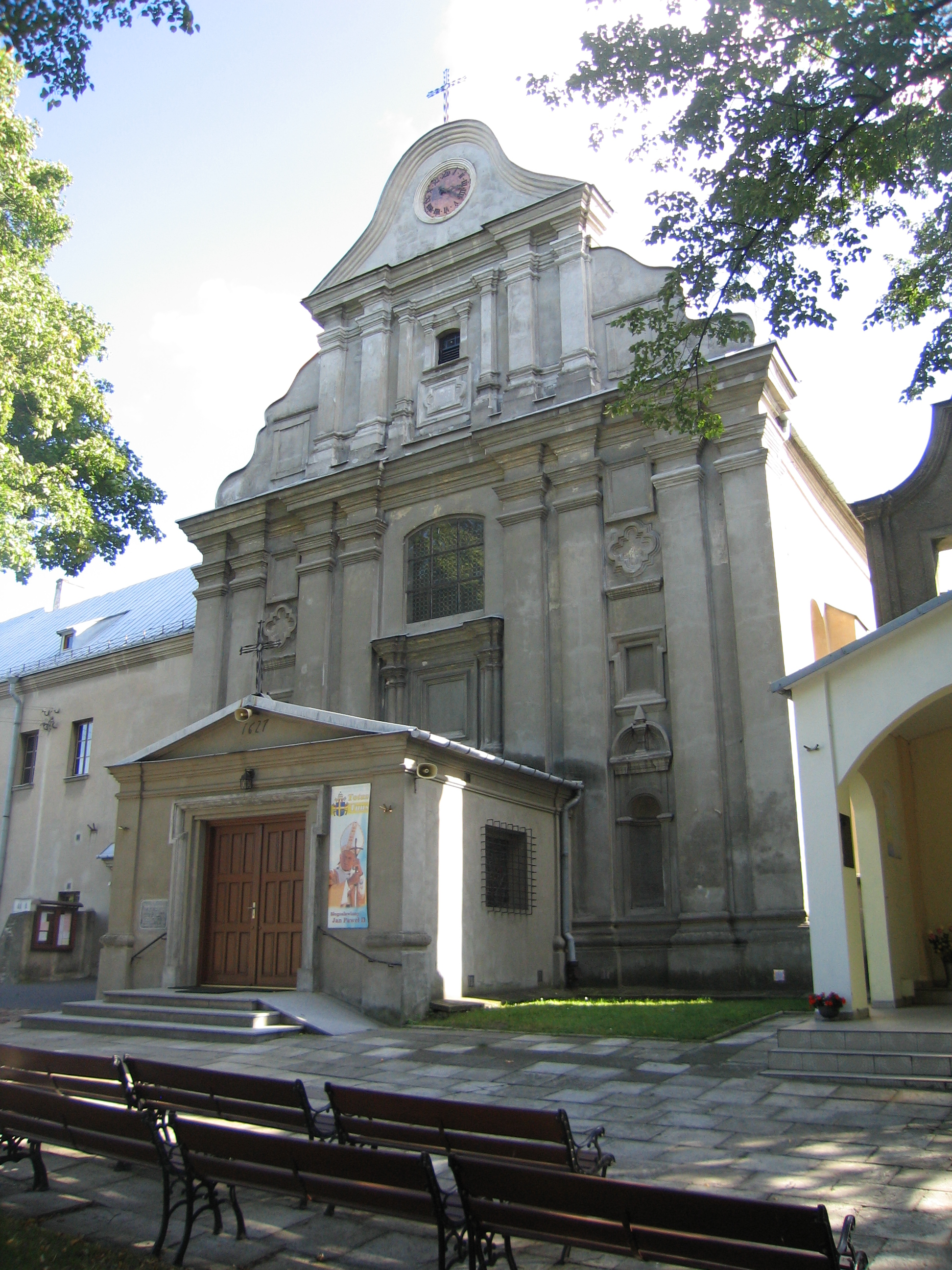 Zespół klasztorny Ojców Reformatów, pocz. XVIII w., w tym: kościół pw. św. Franciszka z Asyżu, nr 8-I-8, 4/8 klasztor, 9-I-9, 9 dzwonnica, 729/A cmentarz przyklasztorny, w tym: ogrodzenie z bramą ul. Reformacka 1 09.1947.